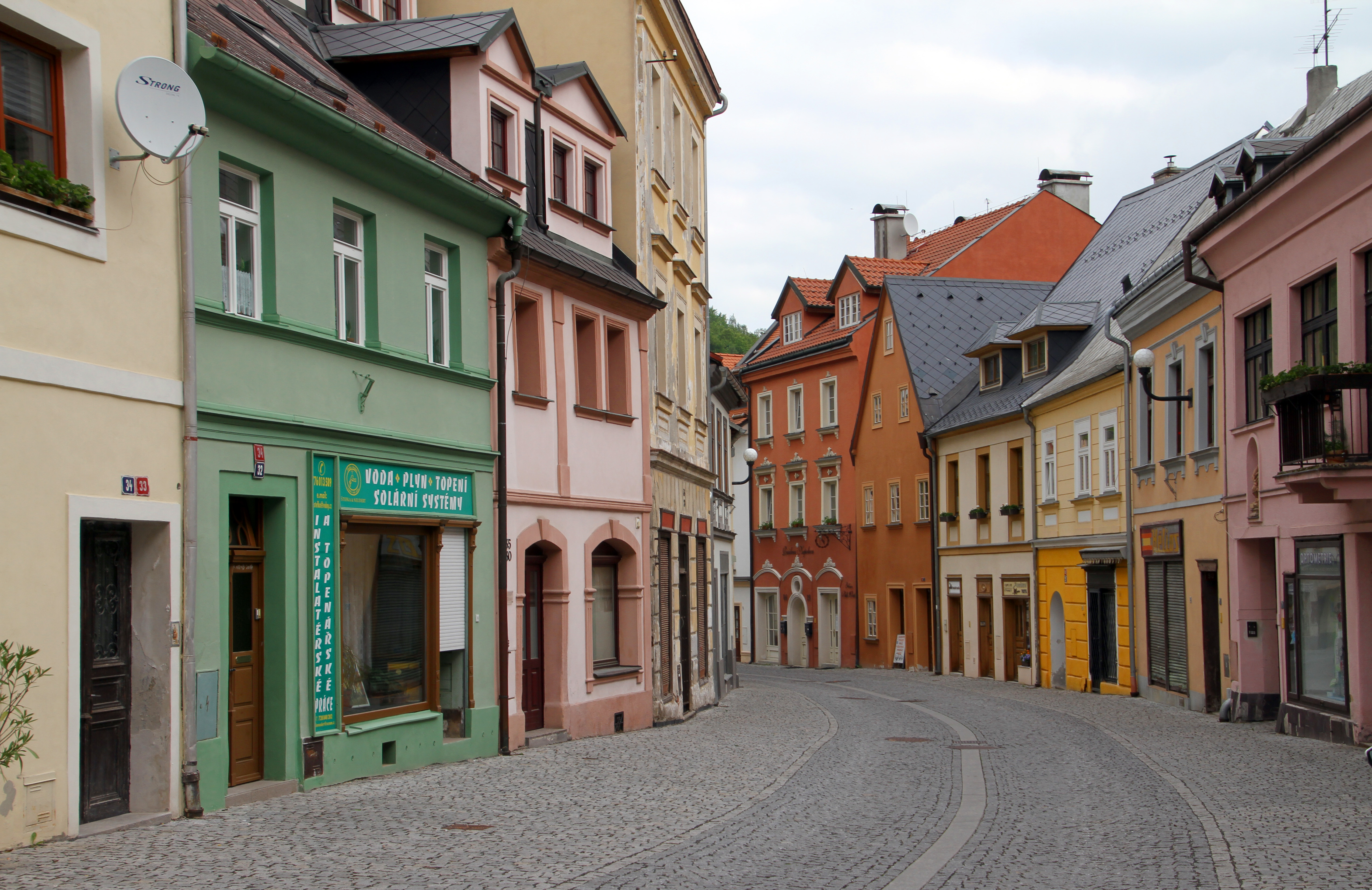 Loket